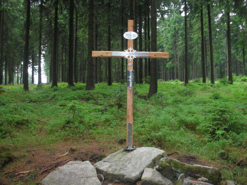 Gipfelkreuz auf dem Schneehübel bei Carlsfeld